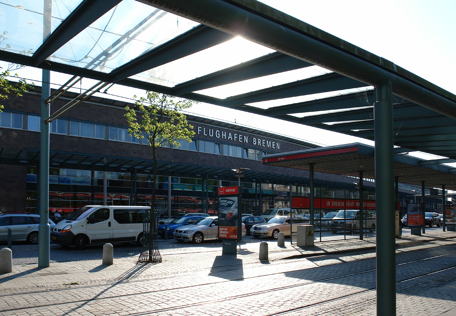 Flughafen Bremen in der Airport City: Haupteingang, Taxenstand und Straßenbahnhaltestelle